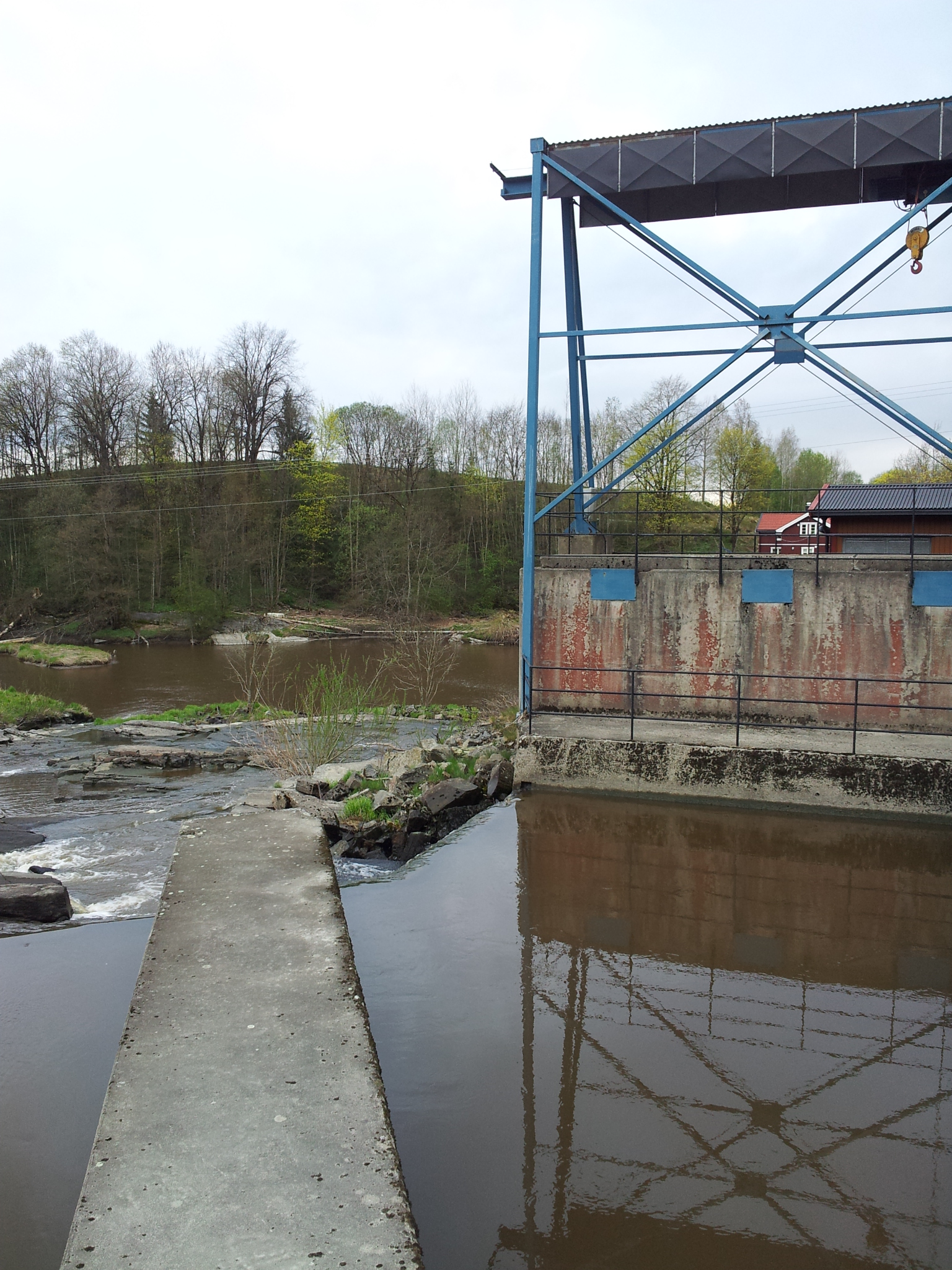 Brekke kraftverk